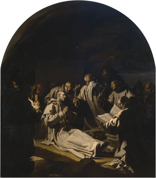 La muerte de San Bruno (1626-1628). Óleo sobre lienzo. Medidas: 337cm x 298cm.